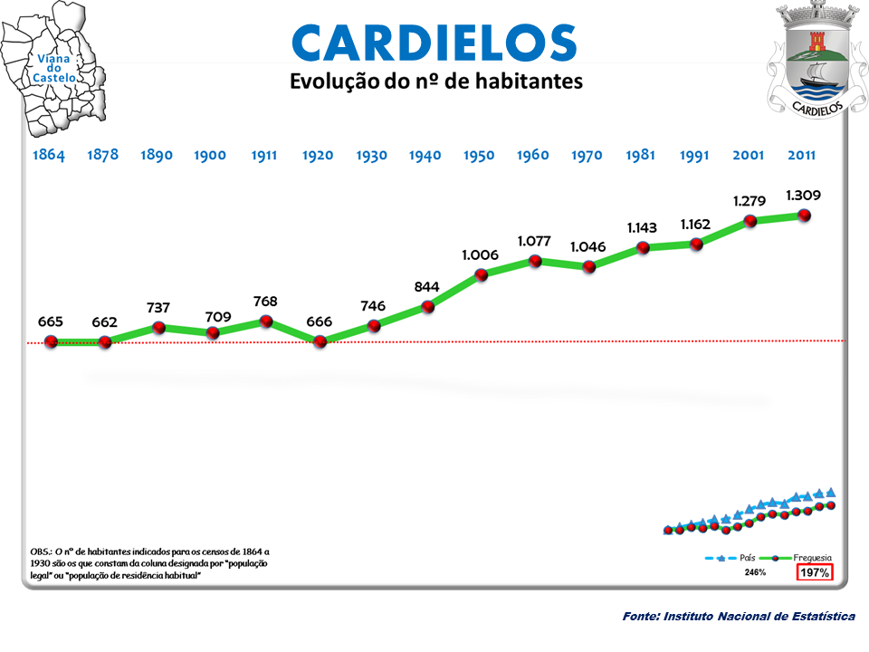 Censos 1864/2011